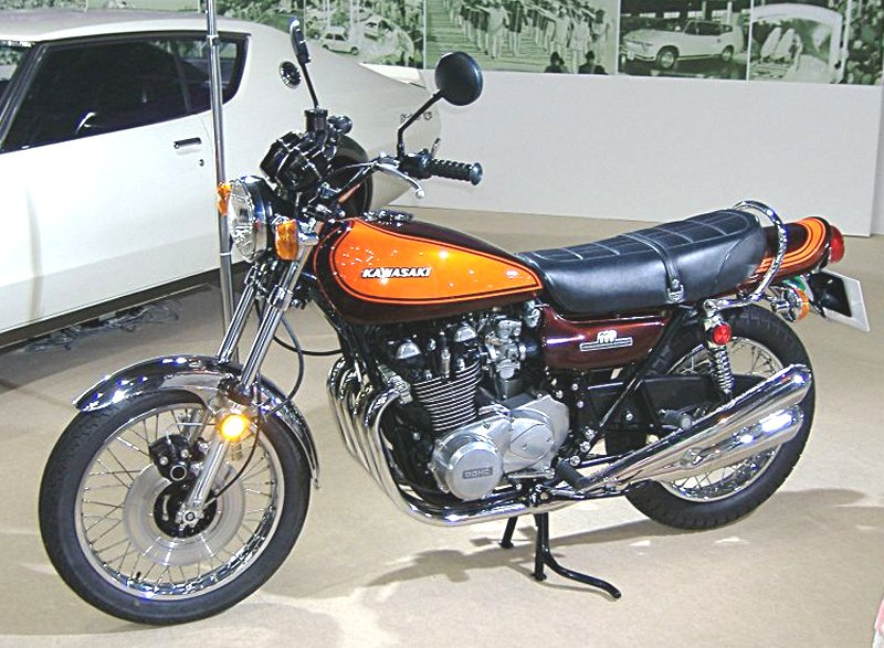 Immagine presa da Commons (GNU Free Documentation License; Image:KAWASAKI Z1.jpg) e modificata.